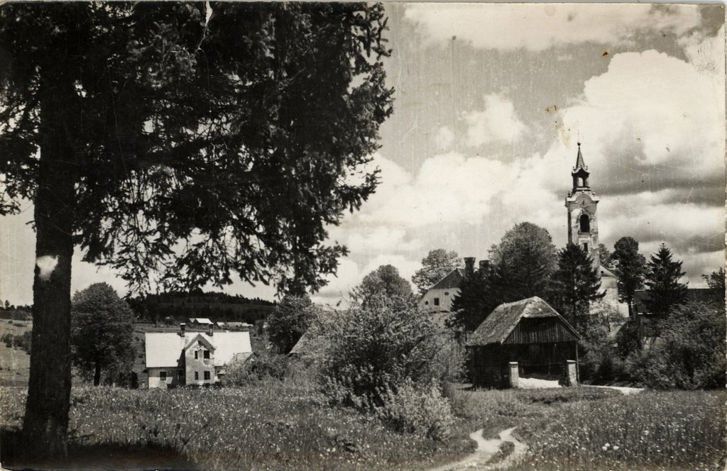 Razglednica Fare na Blokah.